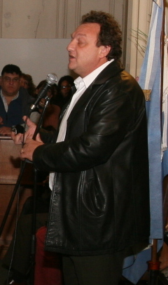 Dr. Mariano Narodowski, Ministro de Educación de la Ciudad Autónoma de Buenos Aires, saluda a los becarios Access